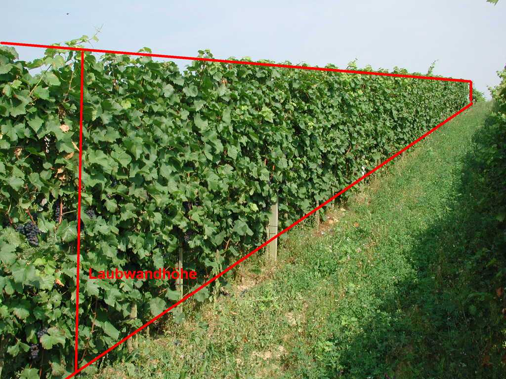 sehr hohe Laubwandfläche einer Weitraumerziehung